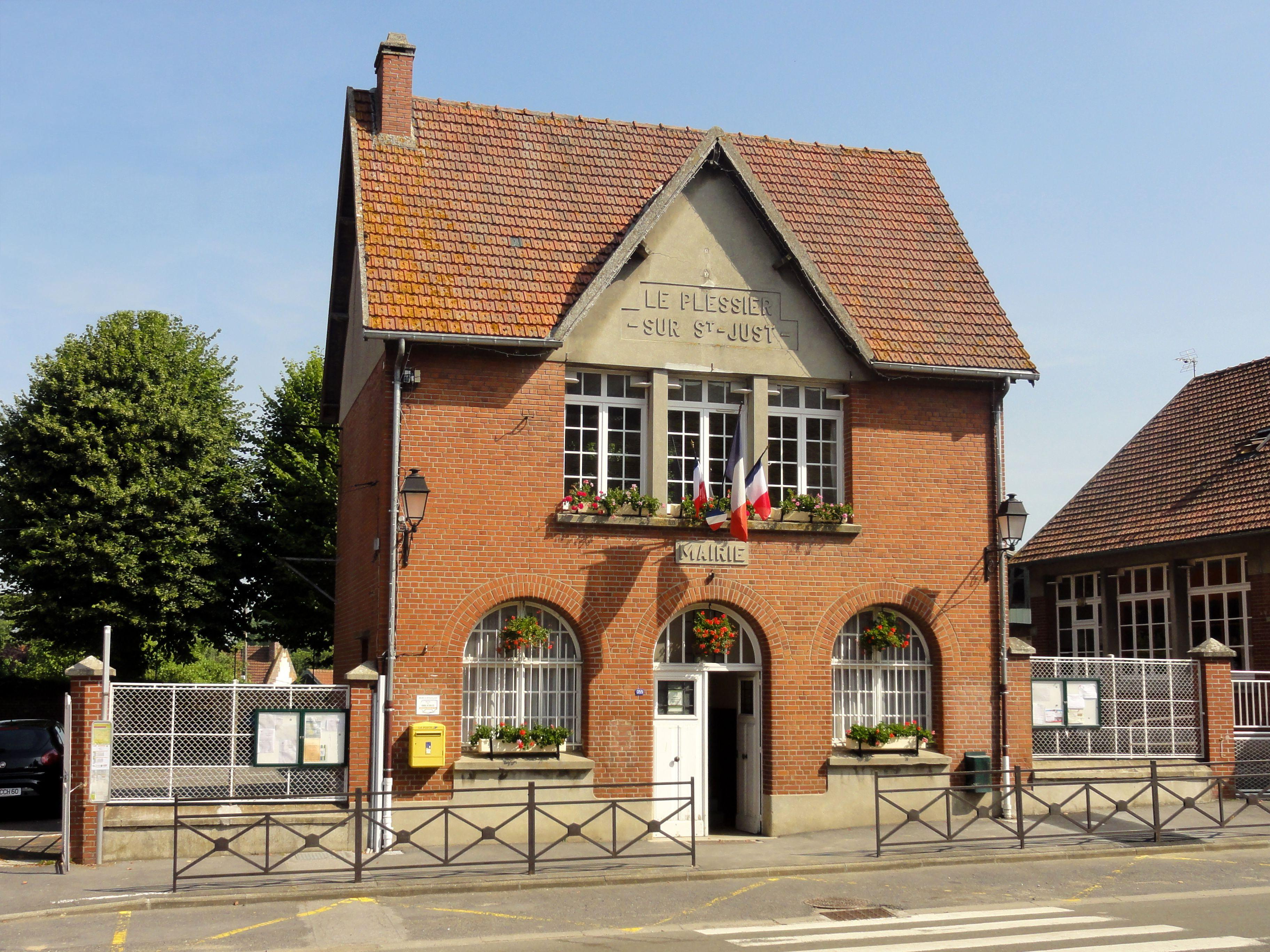 La mairie, rue de Compiègne.